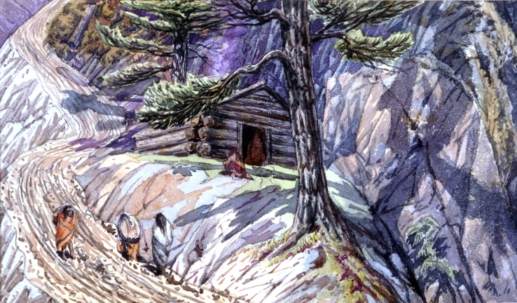 New Government Road, Lillooet, B. C.label QS:Len,"New Government Road, Lillooet, B. C."label QS:Lfr,"Nouvelle route gouvernementale, Lillooet, C.-B."